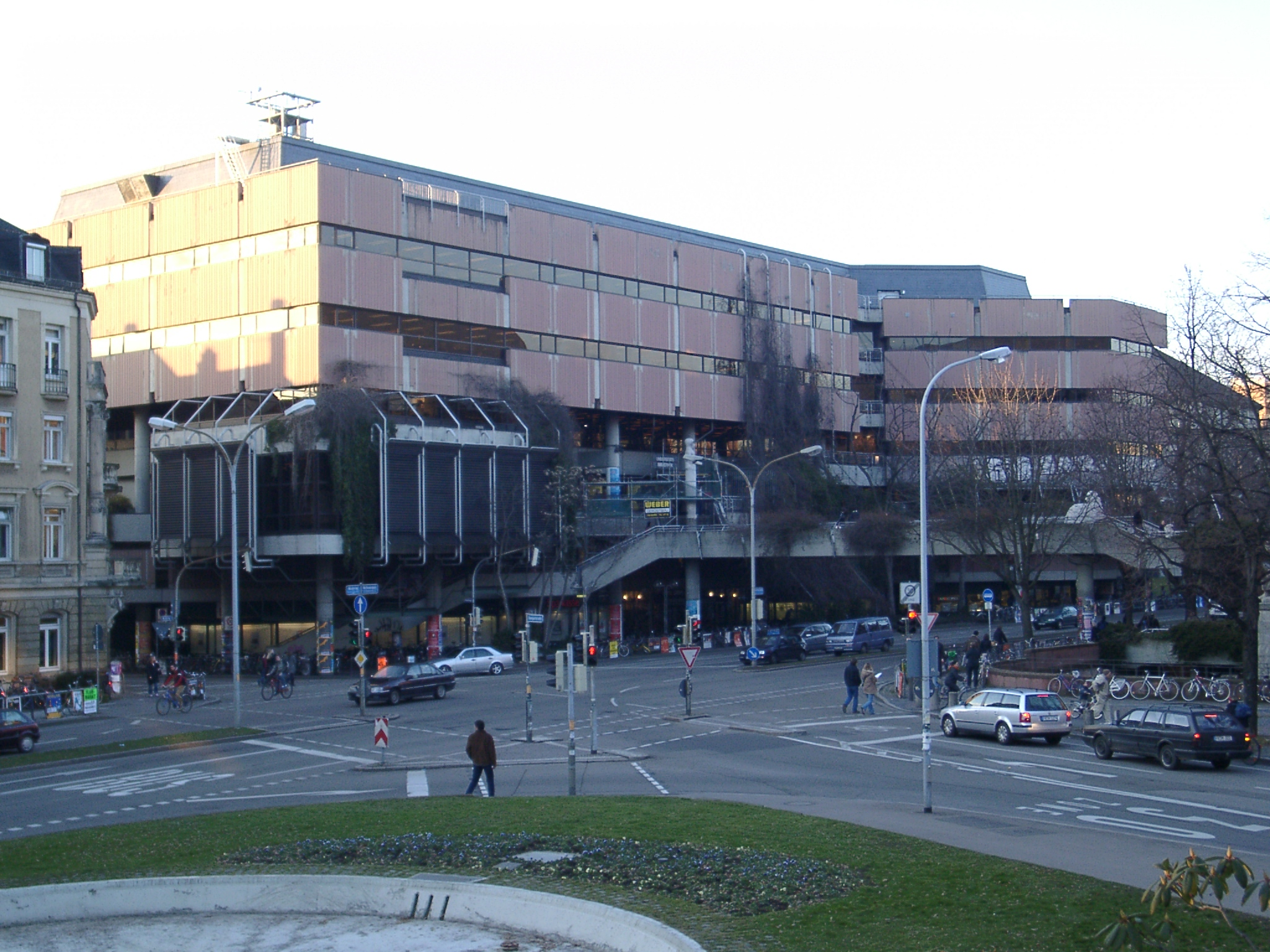 Universitätsbibliothek Freiburg